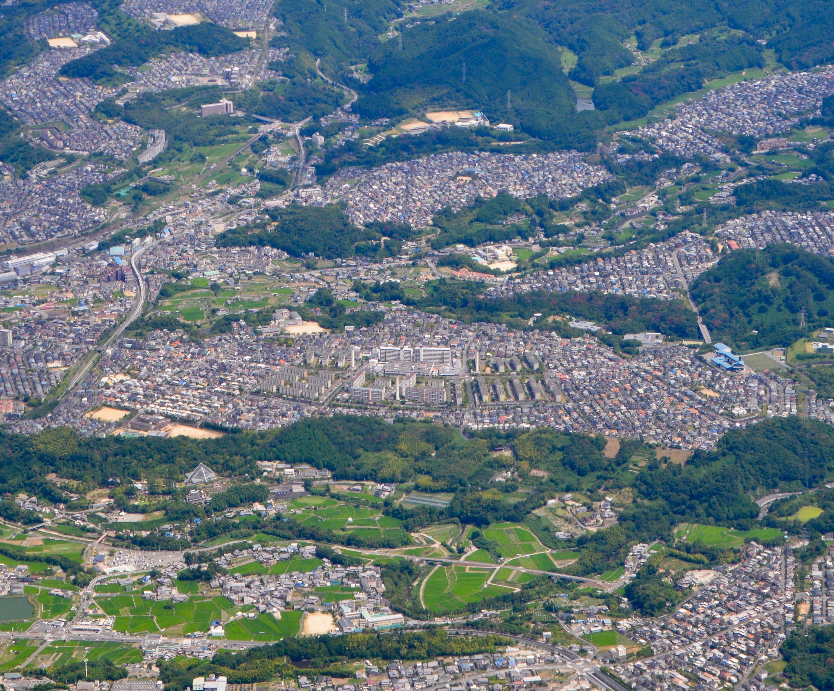 大阪府河内長野市南花台